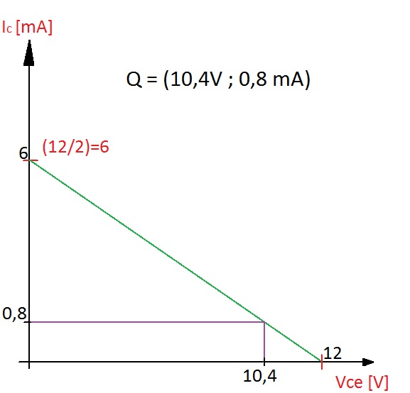 Diagrama de U e I de un transistor donde se detalla el punto Q necesario para su encendido